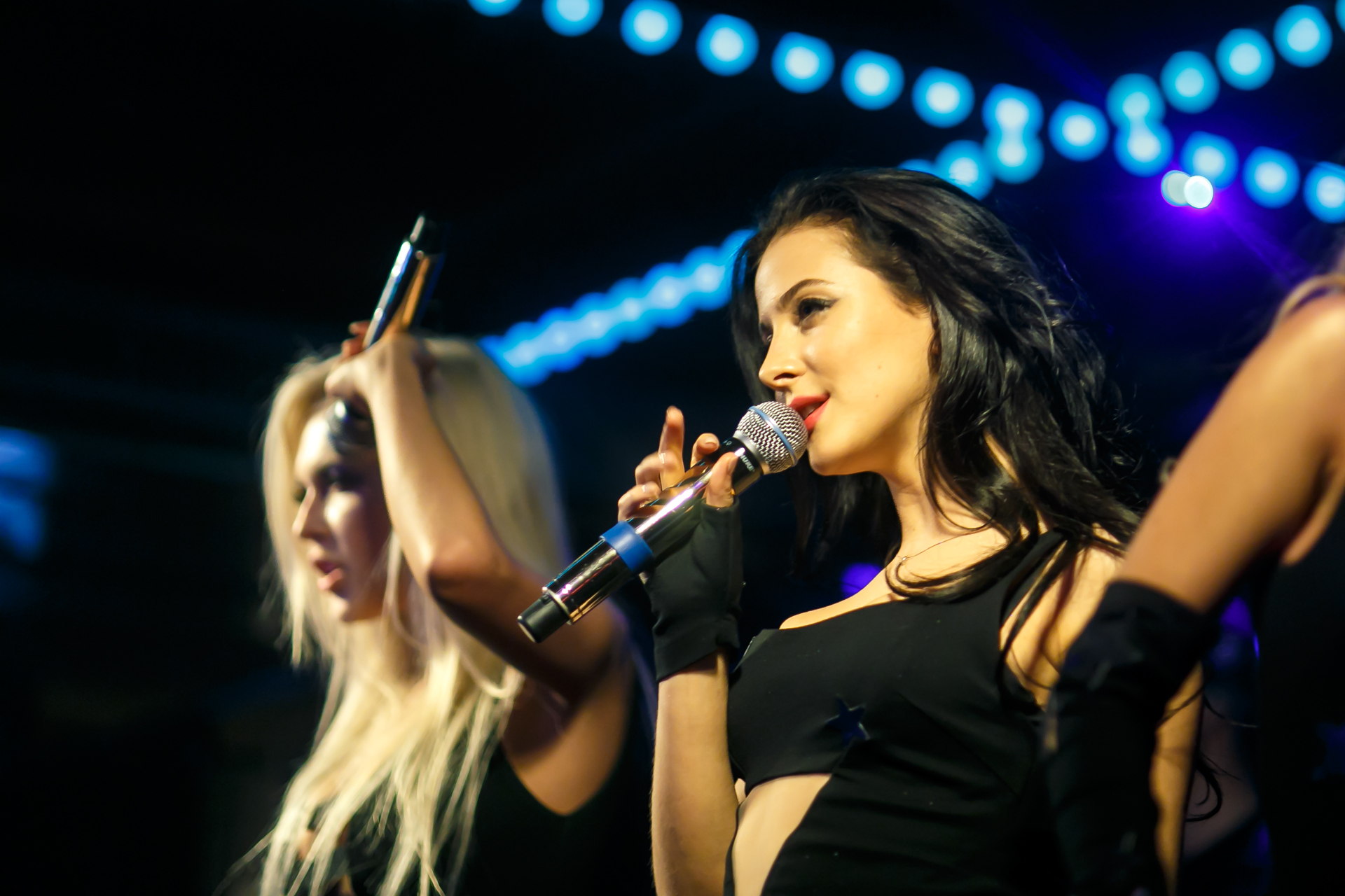 Анастасия Кожевникова в составе группы «ВИА Гра» во время концерта в ресторане «Пряности & Радости»